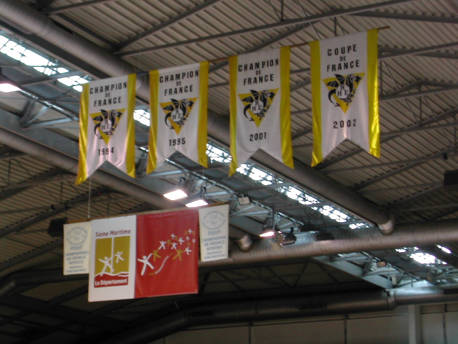 Photo de l'intérieur de la patinoire de Rouen et de certaines bannières de l'équipe.